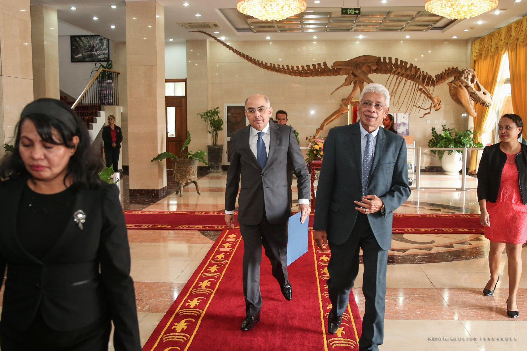 Der ägyptische Botschafter Ashraf Mohamed Moguib Sultan in Osttimor